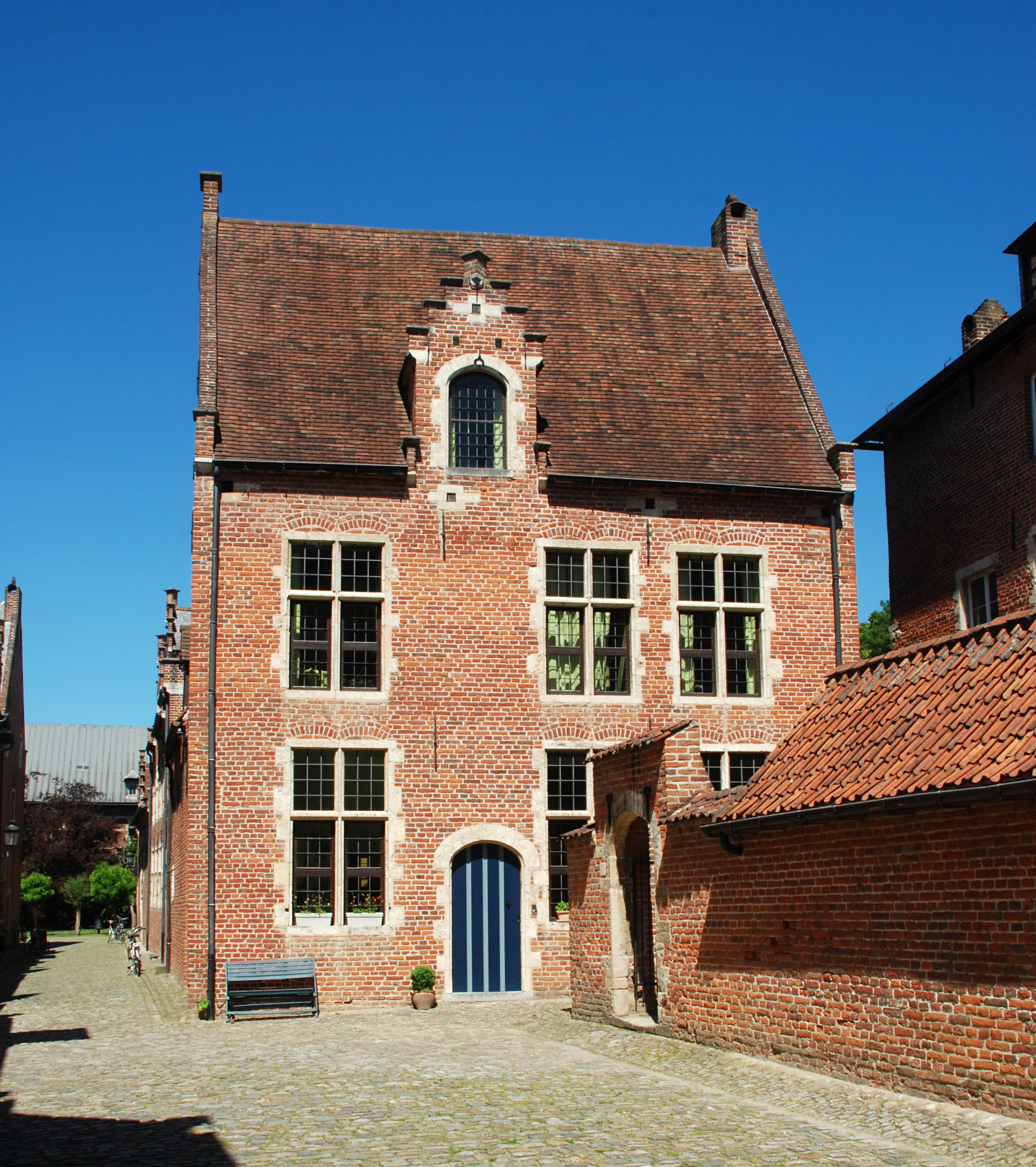 Belgium - Leuven - Groot Begijnhof - Bovenstraat n° 88